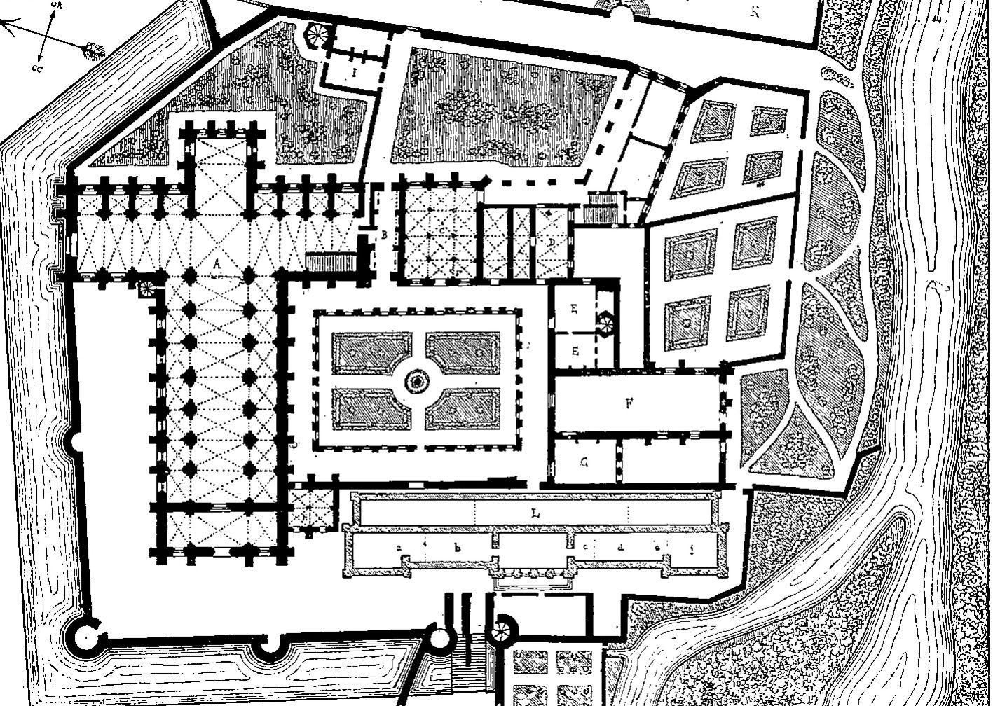 Image illustrant « L'abbaye de Fontenay et l'architecture cistercienne »